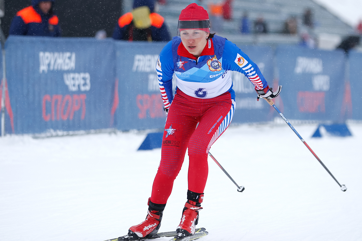 Наталья Коростелева (Россия). Лыжные гонки, женщины, 10 км. III Зимние Всемирные военные игры. Лыжно-биатлонный комплекс «Лаура», Сочи, Россия. 24 февраля 2017. Фото Alexander Safonov/CISM2017Natalia KOROSTELEVA (Russia). Cross Country Skiing, Women, 10 km. 3rd CISM World Winter Games. Laura Cross-Country Ski&Biathlon Centre, Sochi, Russian Federation. February 24, 2017. Photo by Alexander Safonov/CISM2017